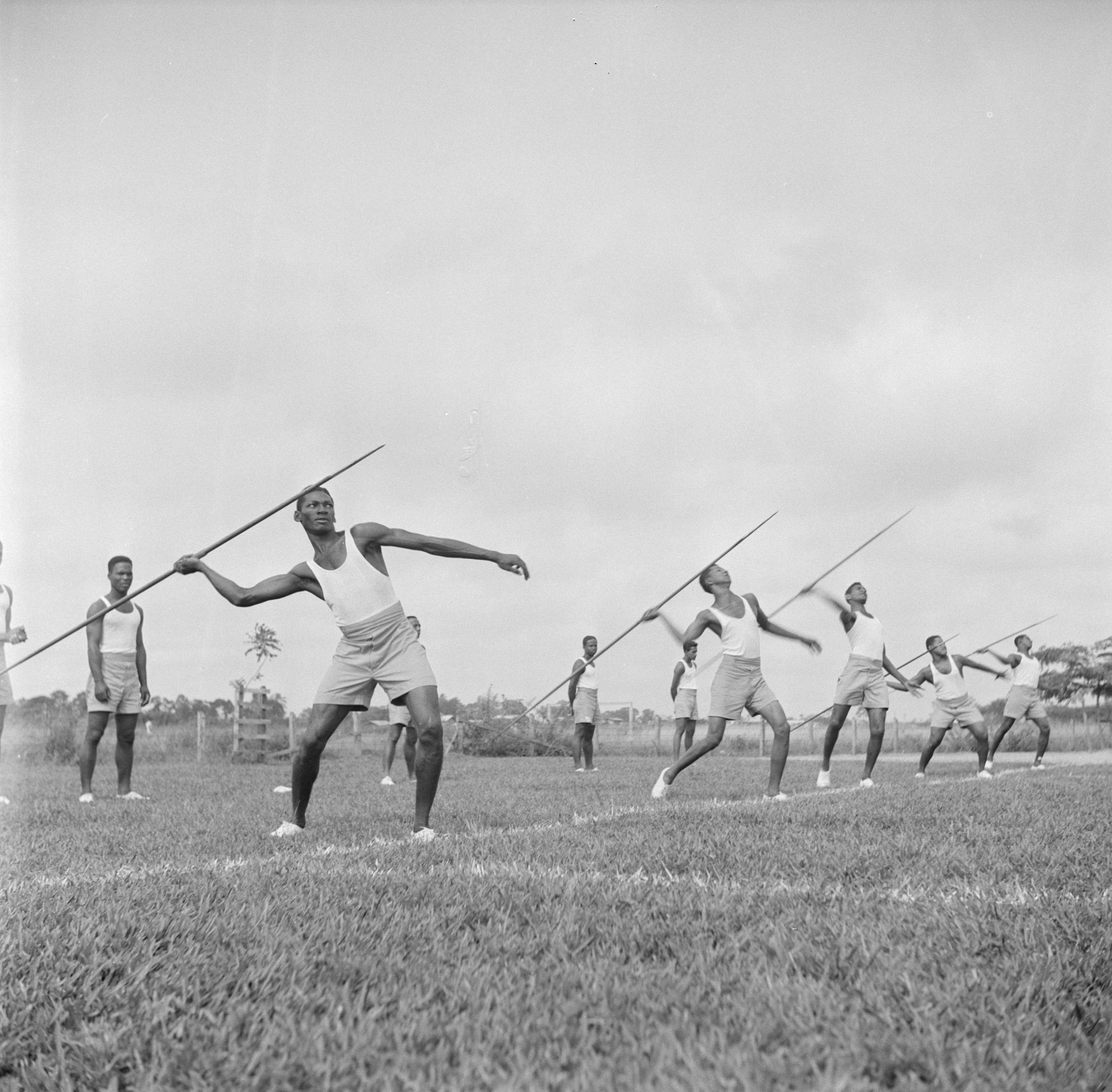 Collectie / Archief : Fotocollectie Van de Poll Reportage / Serie : Nederlandse Antillen en Suriname ten tijde van het koninklijk bezoek van koningin Juliana en prins Bernhard in 1955 Beschrijving : Sporten op de Politieschool in Suriname Datum : 1 oktober 1955 Locatie : Suriname Trefwoorden : politiescholen, speerwerpen, sport Fotograaf : Poll, Willem van de Auteursrechthebbende : Nationaal Archief Materiaalsoort : Negatief (zwart/wit) Nummer archiefinventaris : bekijk toegang 2.24.14.02 Bestanddeelnummer : 252-2365